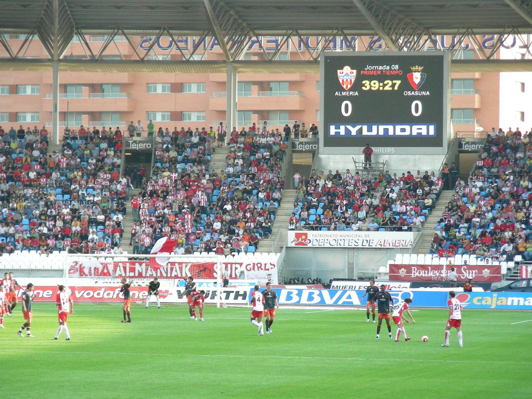 Aspecto del Estadio Mediterráneo, durante la disputa de la jornada 8 de la temporada 2007-2008, entre la U.D. Almería y C.A. Osasuna.